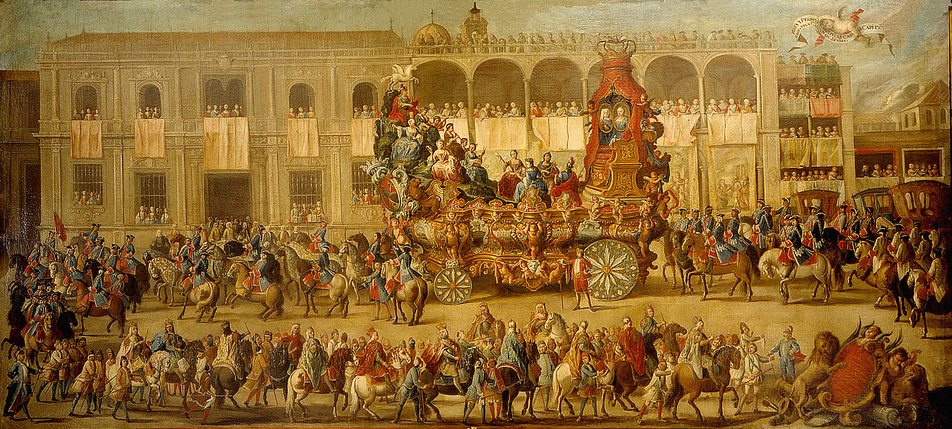 Esta obra, llamada 'Carro del Parnaso', forma parte de un grupo de ocho grandes lienzos de igual tamaño que representan los carros triunfales que desfilaron por la ciudad de Sevilla en 1747 durante la Máscara que los obreros de la Real Fábrica de Tabacos de Sevilla celebraron con motivo de la subida al trono español de Fernando VI y de su esposa, la reina Bárbara de Braganza.